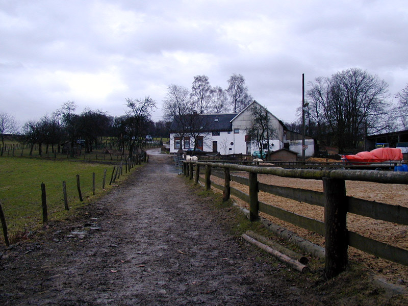 Hofschaft Birken, Radevormwald, selbst 2002 fotografiert, GFDL